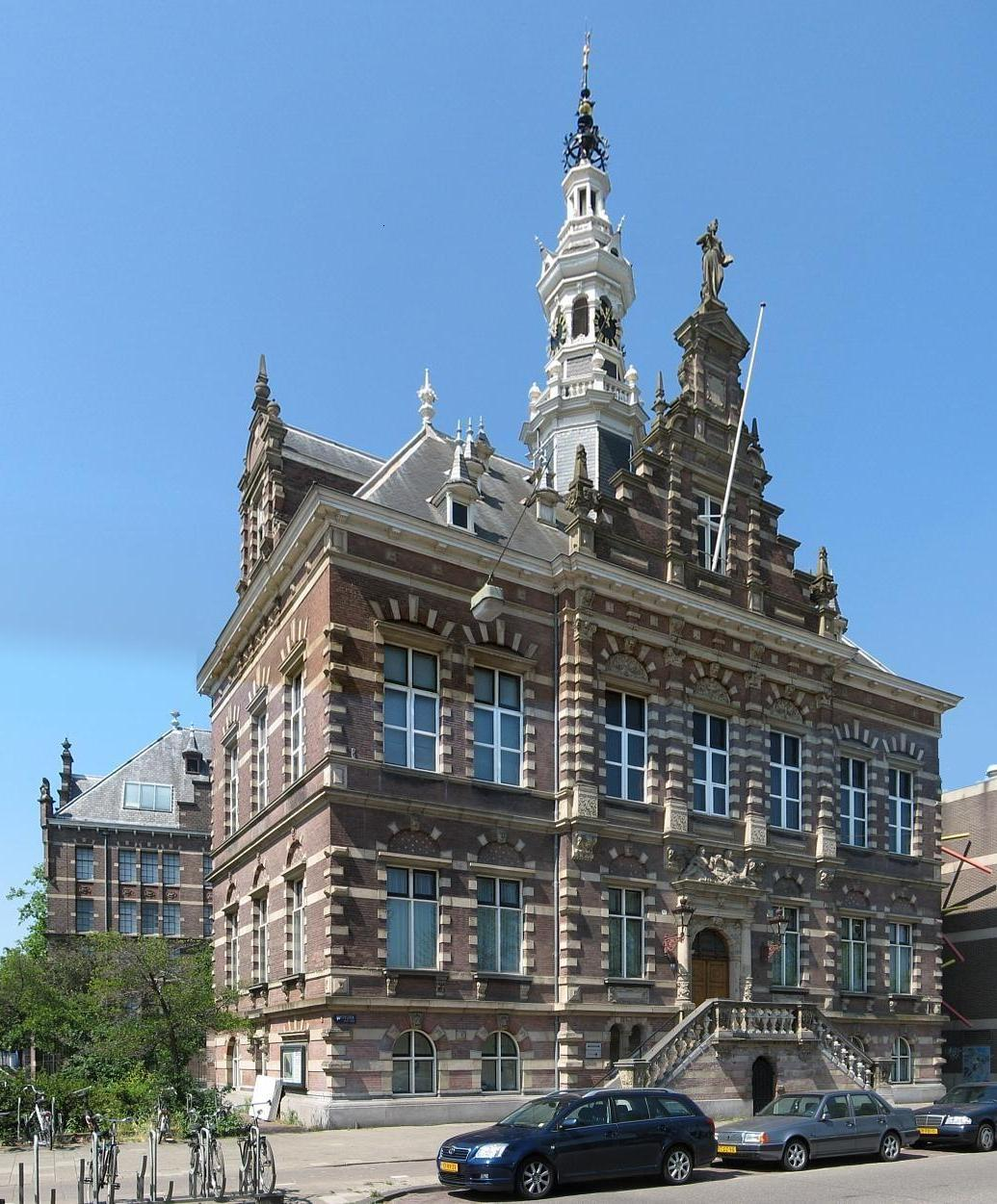 Voormalige raadshuis Nieuwer-Amstel in Amsterdam